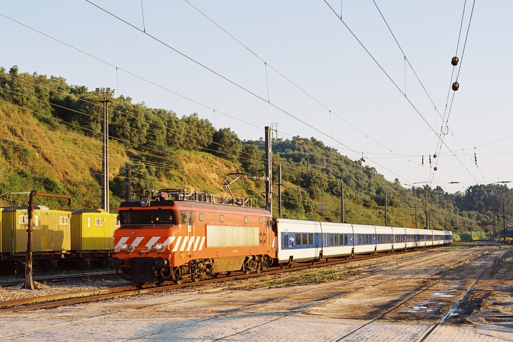 La locomotora eléctrica 2605 de CP en Santarém con el Trenhotel Lusitania.